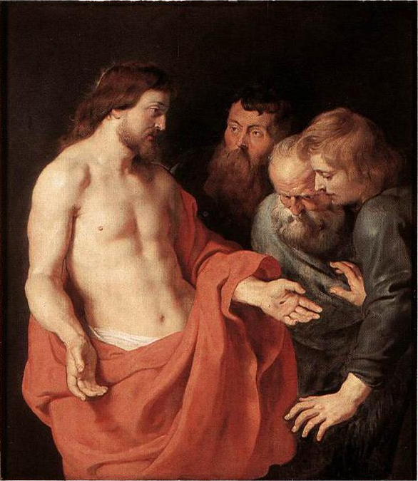 Chúa Giê-xu hiện ra với các sứ đồ.